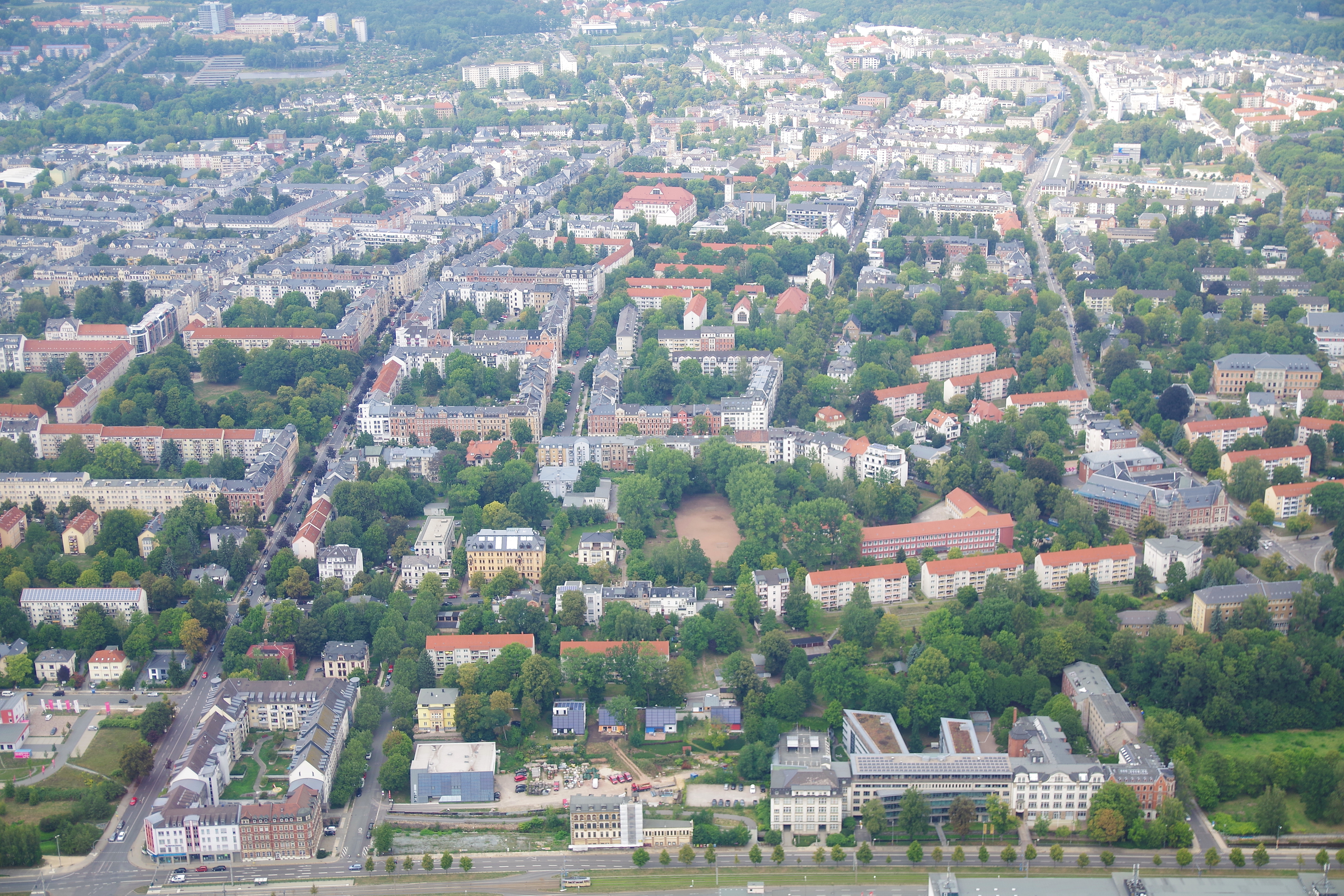 Kaßberg